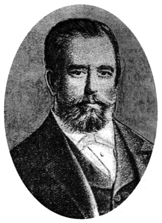 Фотопортрет купца 1-й гильдии, мецената, почётного гражданина Киева Михаила Дегтерёва (1831–1898